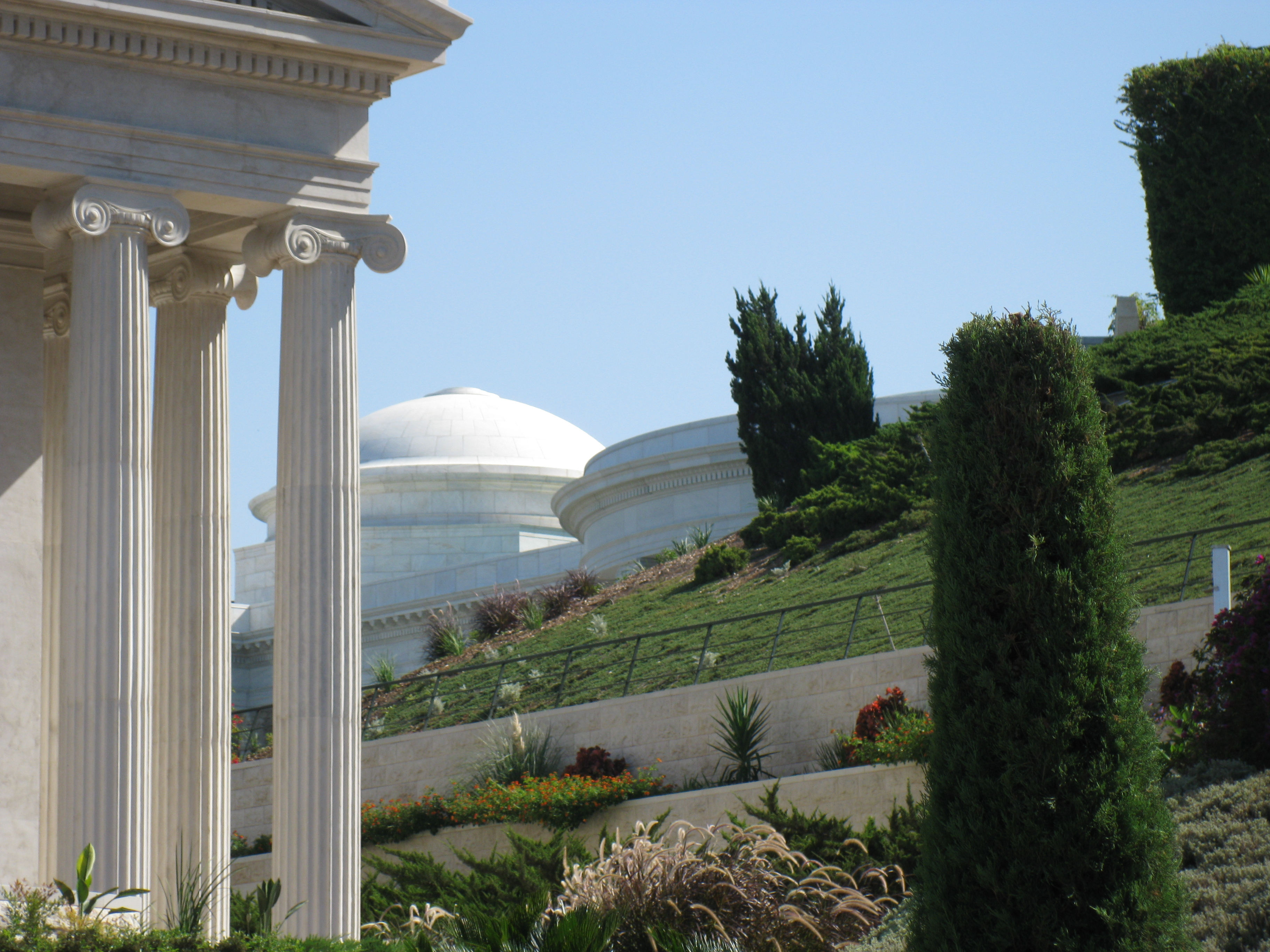 Bahá'í Terraces הגנים הבהאיים